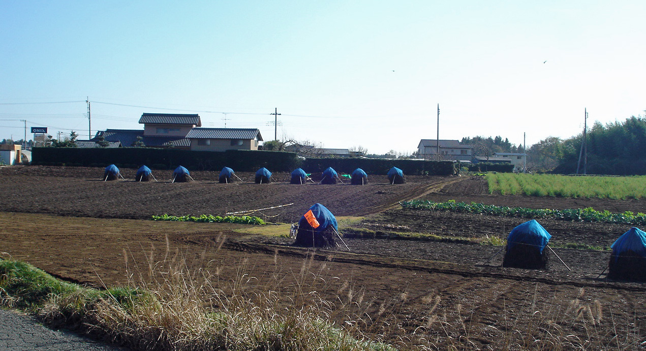 落花生畑